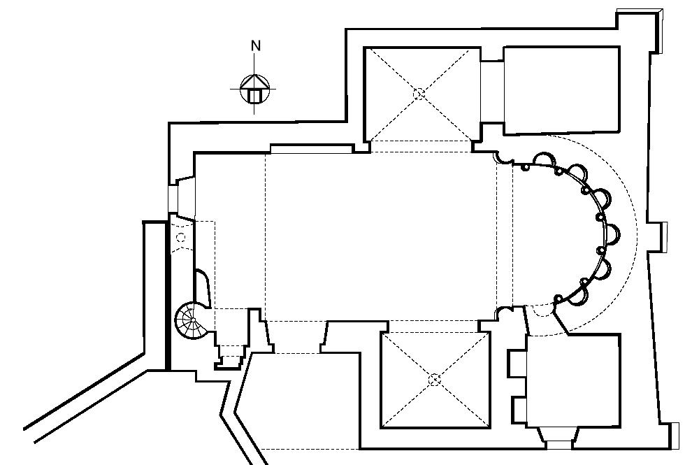 Planta actual de Sant Martí del Congost (Aiguafreda, Vallès Oriental - Catalunya)